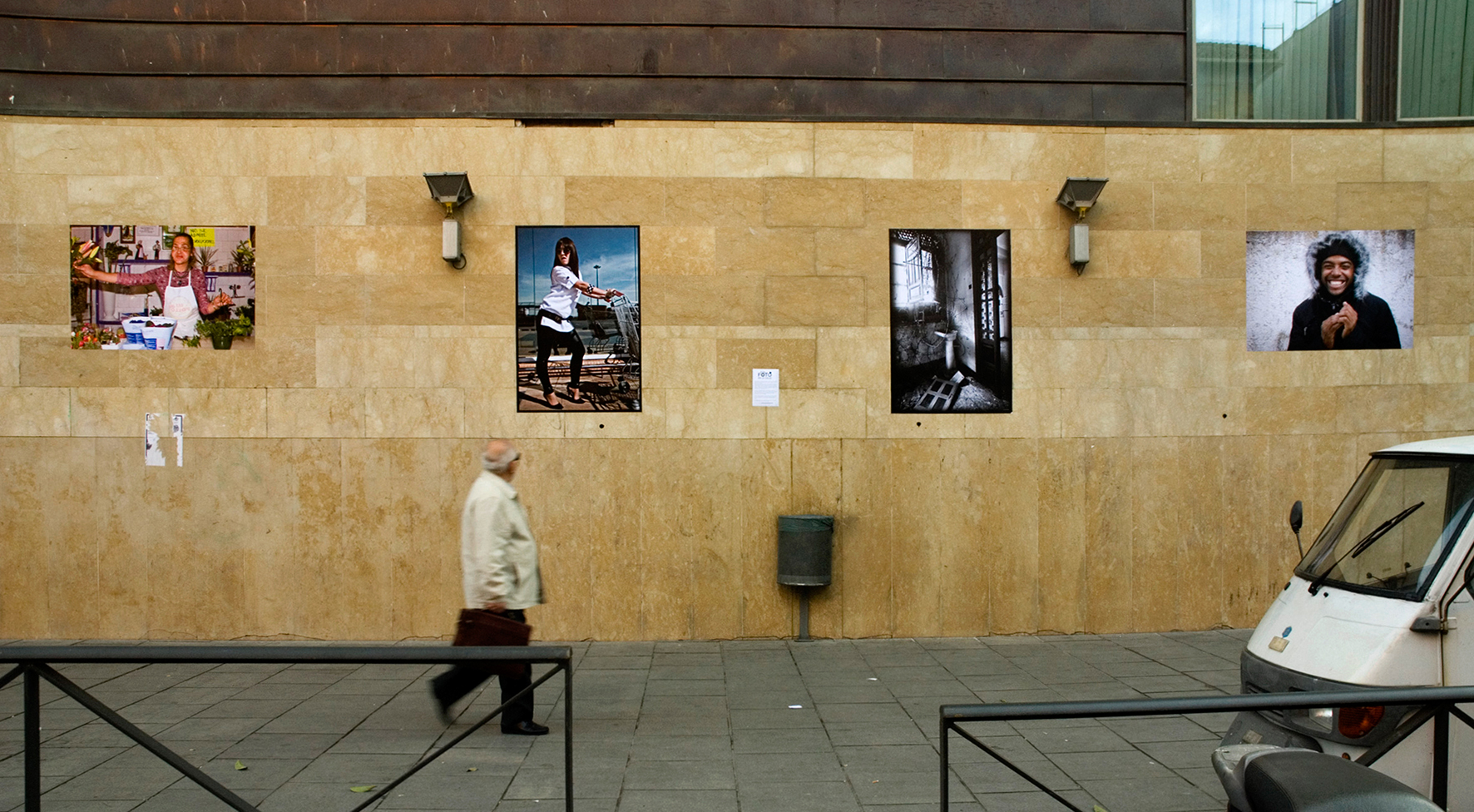 18/05/09.Pon una foto en la calle. Mercado de San Agustín. Granada